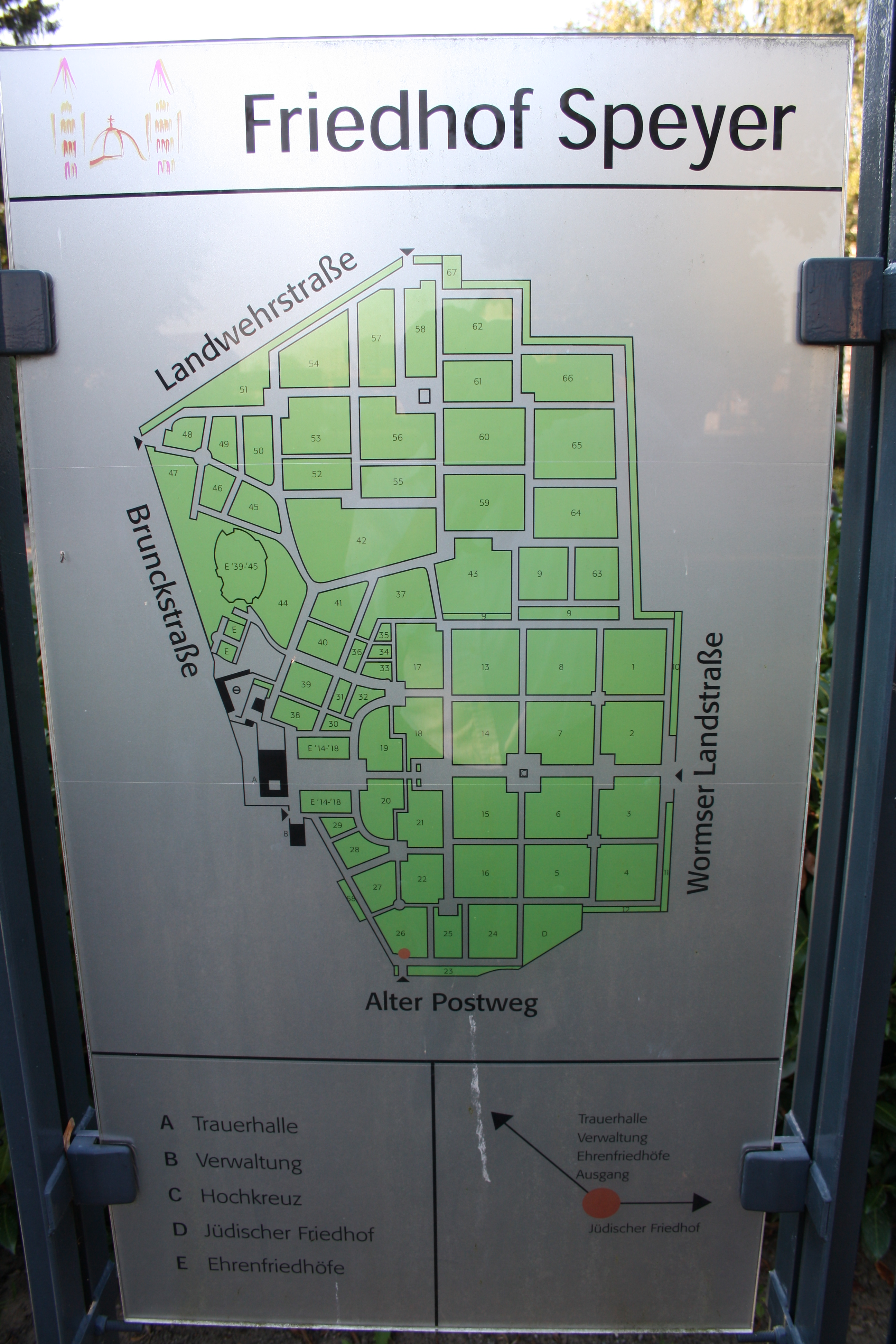 Übersichtsplan Friedhof Speyer mit Nord-Süd-Ausrichtung, Standort am Zugang Alter Postweg